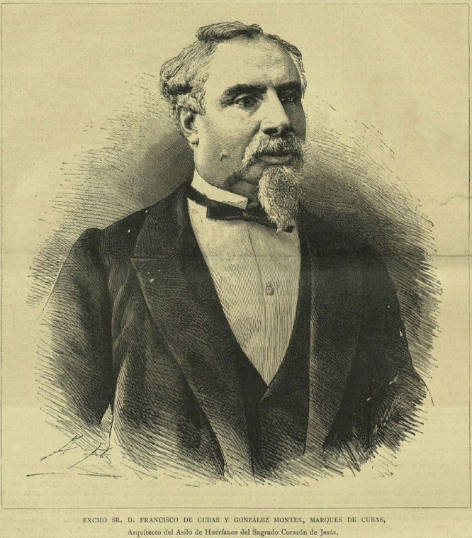 Retrato de Francisco de Cubas, recogido en la revista española 'La Ilustración Católica en 1886.